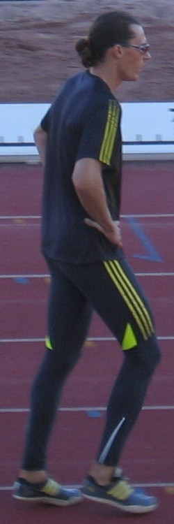 Tommi Evilä Paavo Nurmen kisoissa, Paavo Nurmen stadionilla, Turussa, 24. kesäkuuta 2009